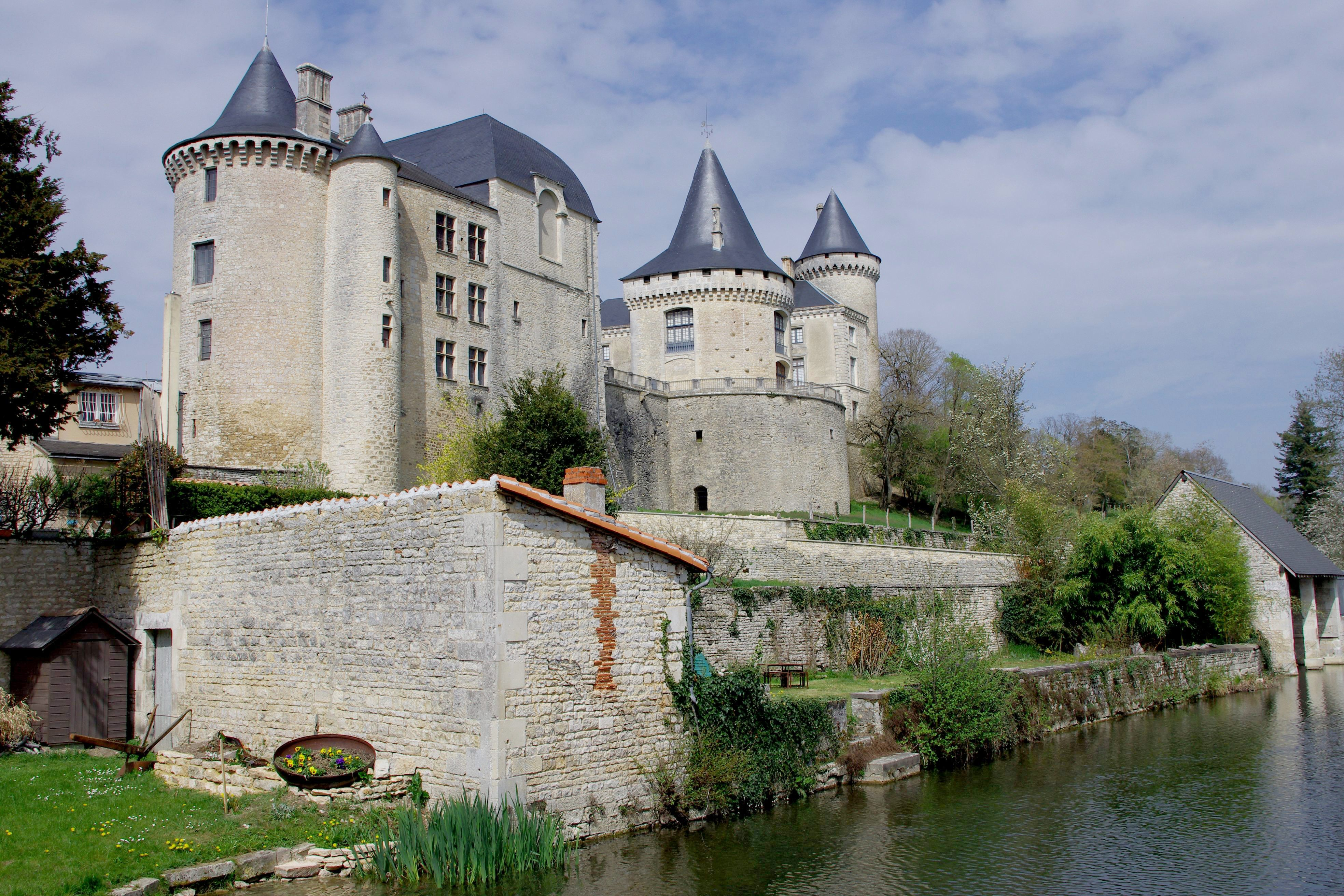 Le Château de Verteuil, Charente, France.